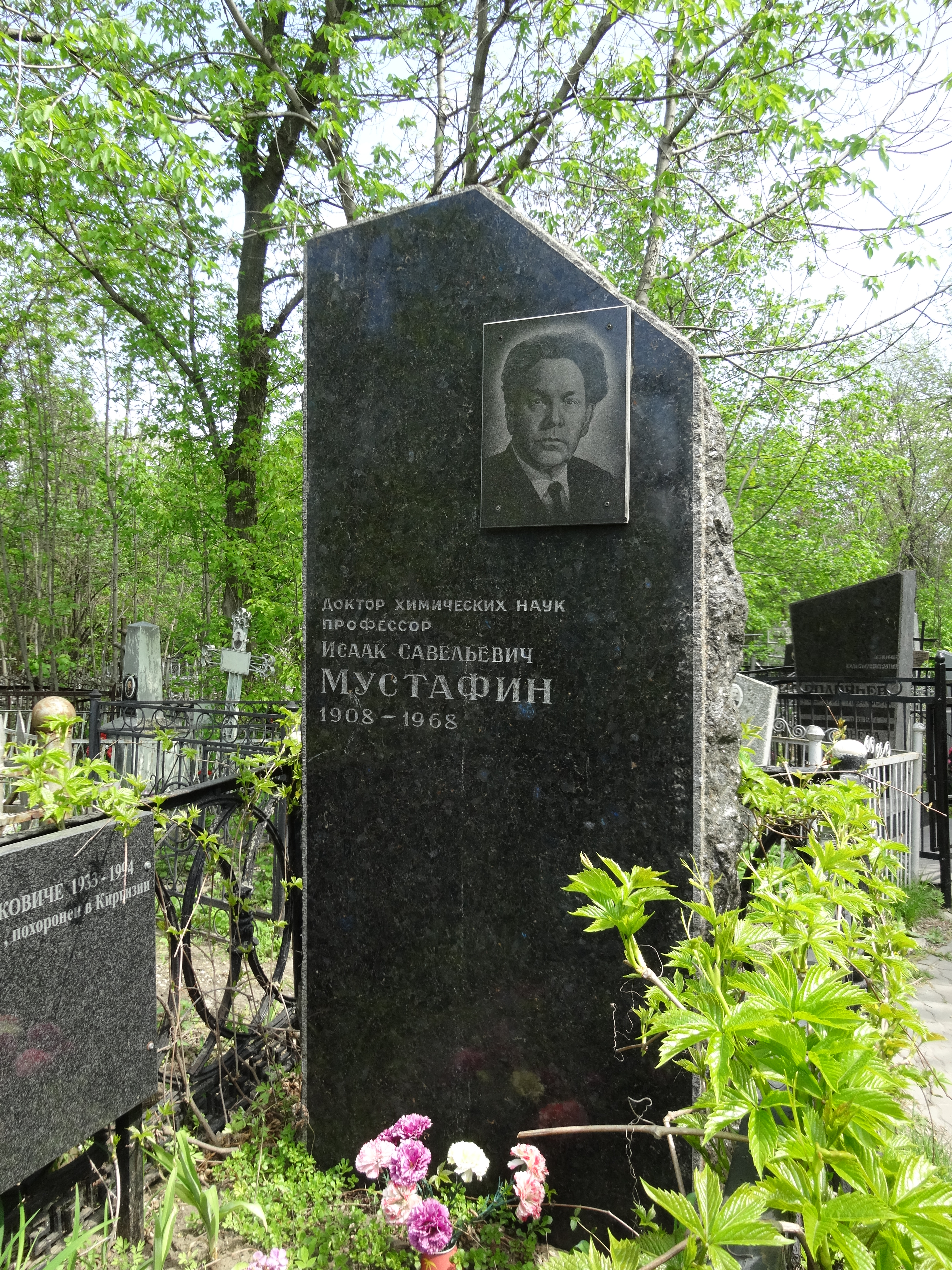 Могила И.С. Мустафина, химика: Воскресенское кладбище (1й участок), Саратов, Саратовская область.